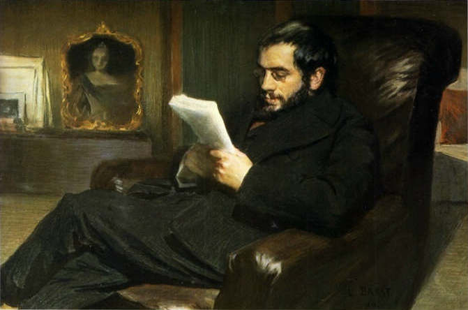 Portrait des russischen Malers und Schriftstellers Alexander_Benois, Wasserfarben und Pastel / russisches Museum, St Petersburg